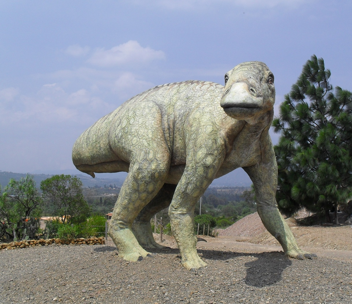 Reconstrución de Iguanodonte a escala real en el Parque Temático Gondava, en el departamento de Boyacá, Colombia